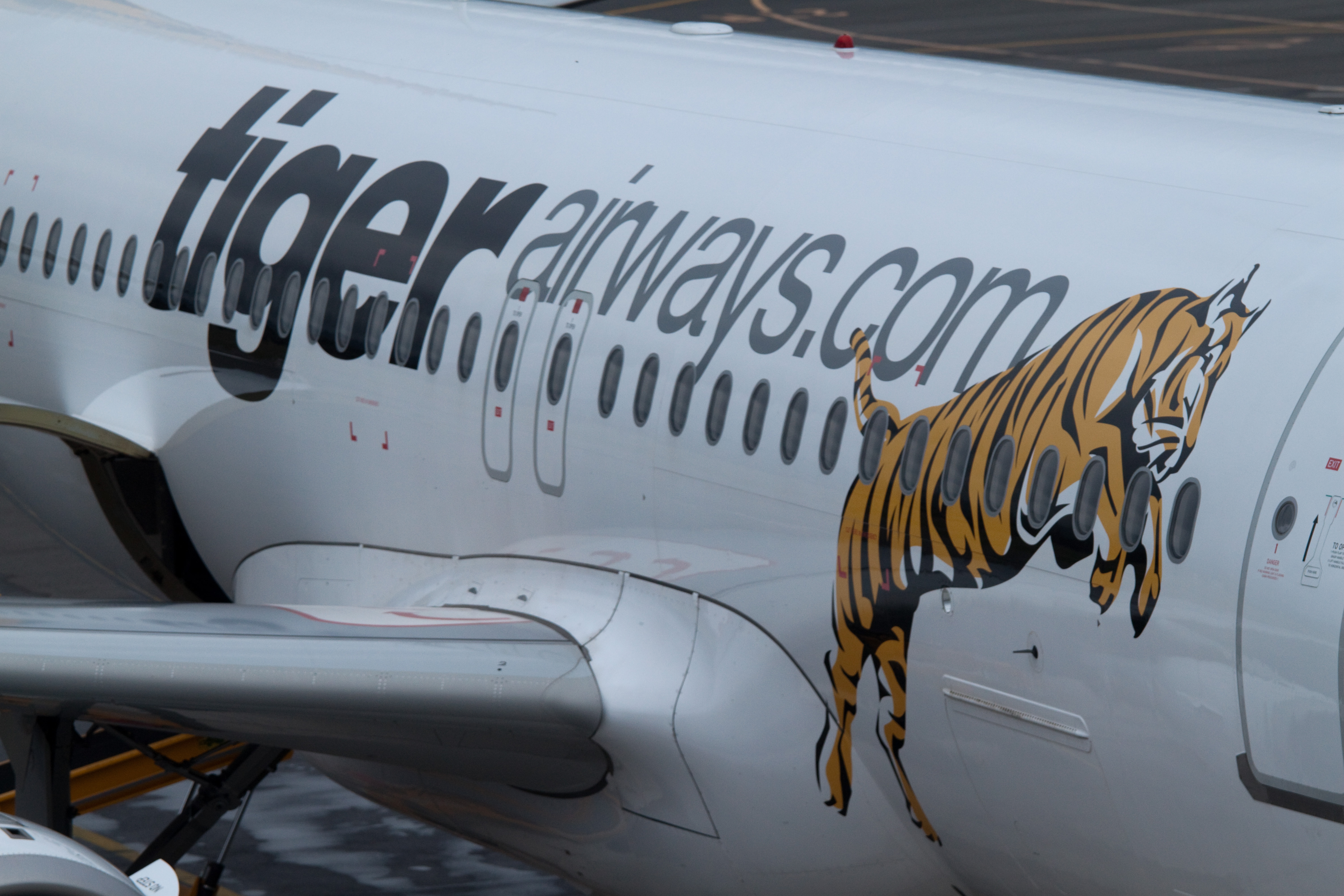 Aircraft at Adelaide Airport